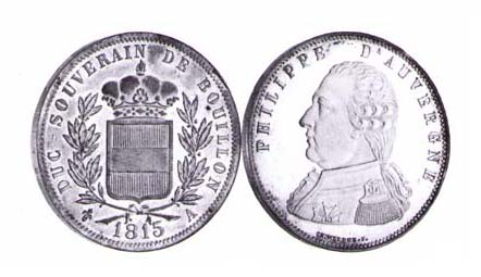 Pièces de monnaie à l'effigie de Philippe d'Auvergne, duc de Bouillon. Frappée en 1815, jamais en circulation.